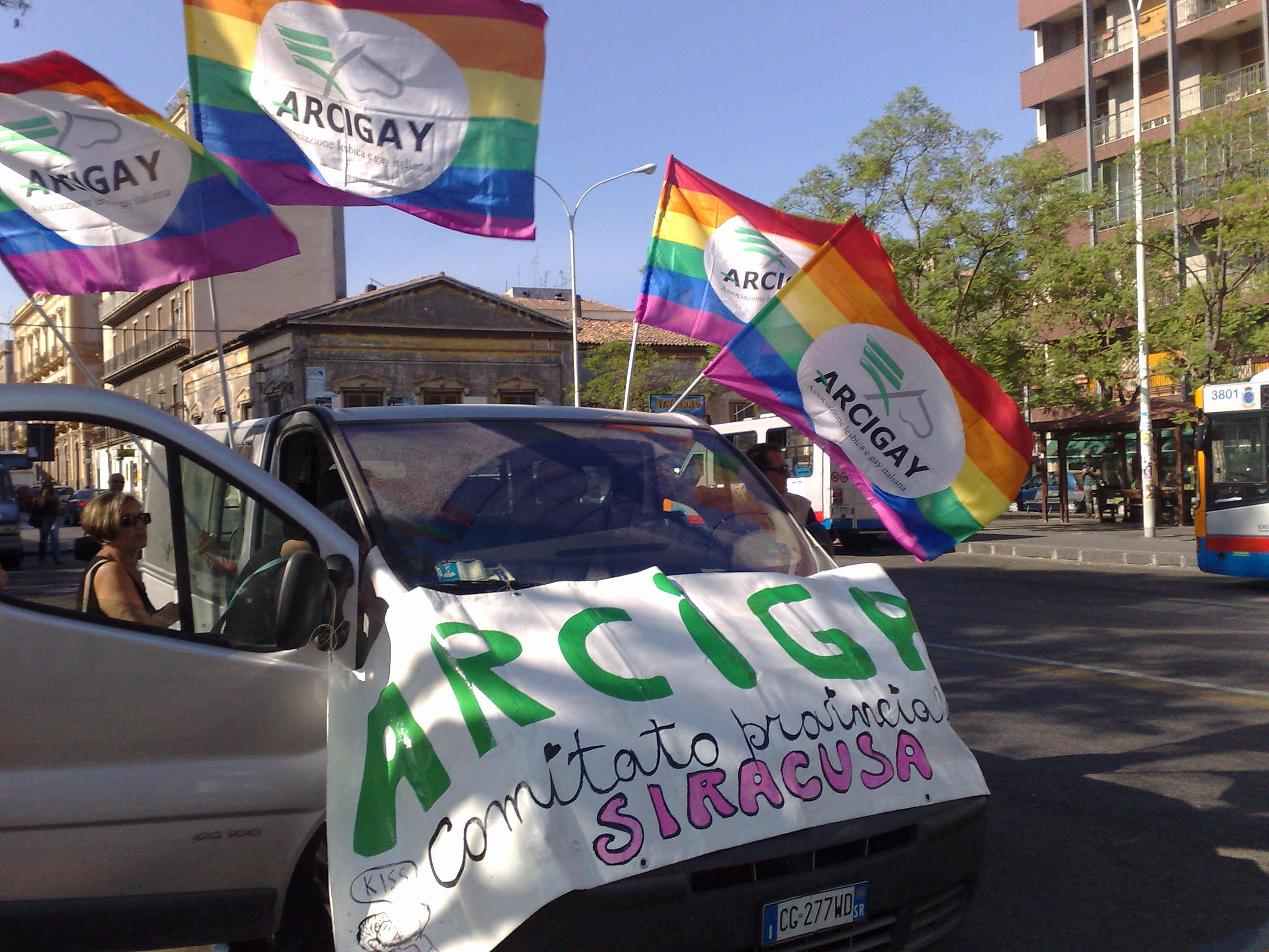 Pride a Catania 2008, Associazione Arcigay Siracusa